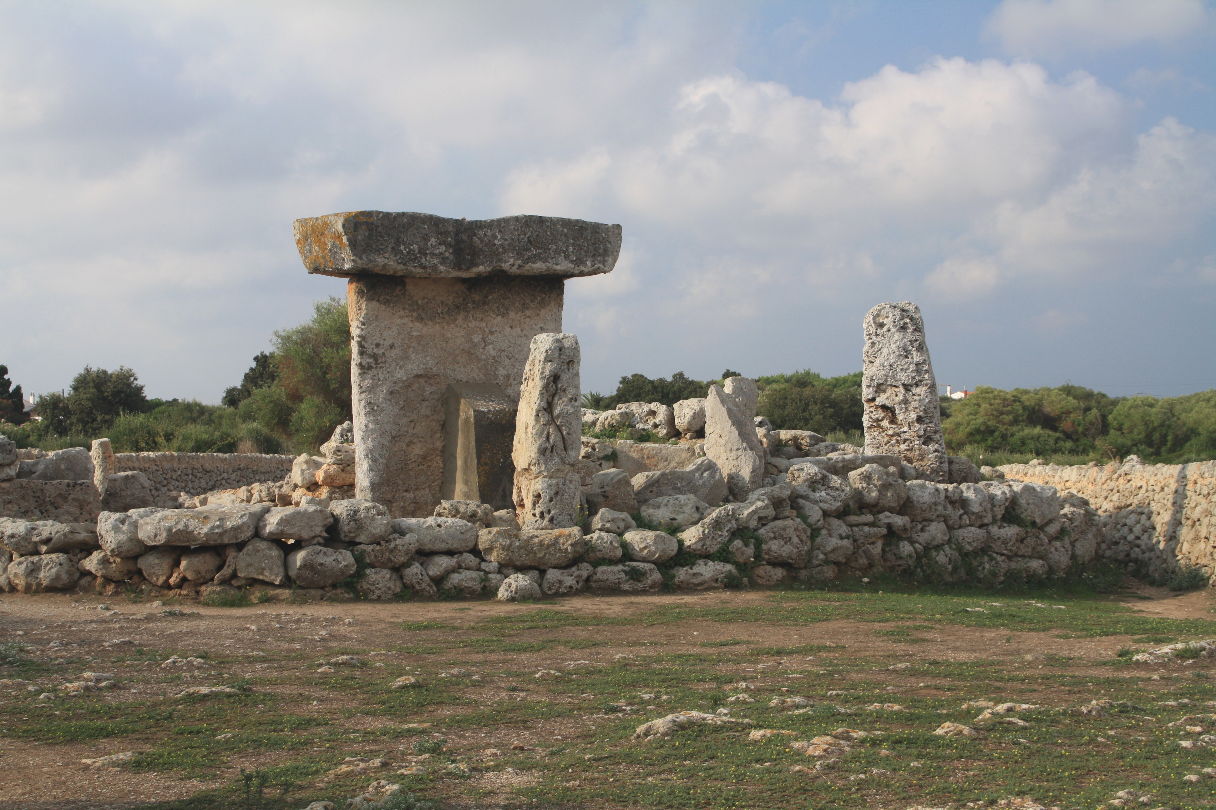 Taula in Trepucó, Menorca